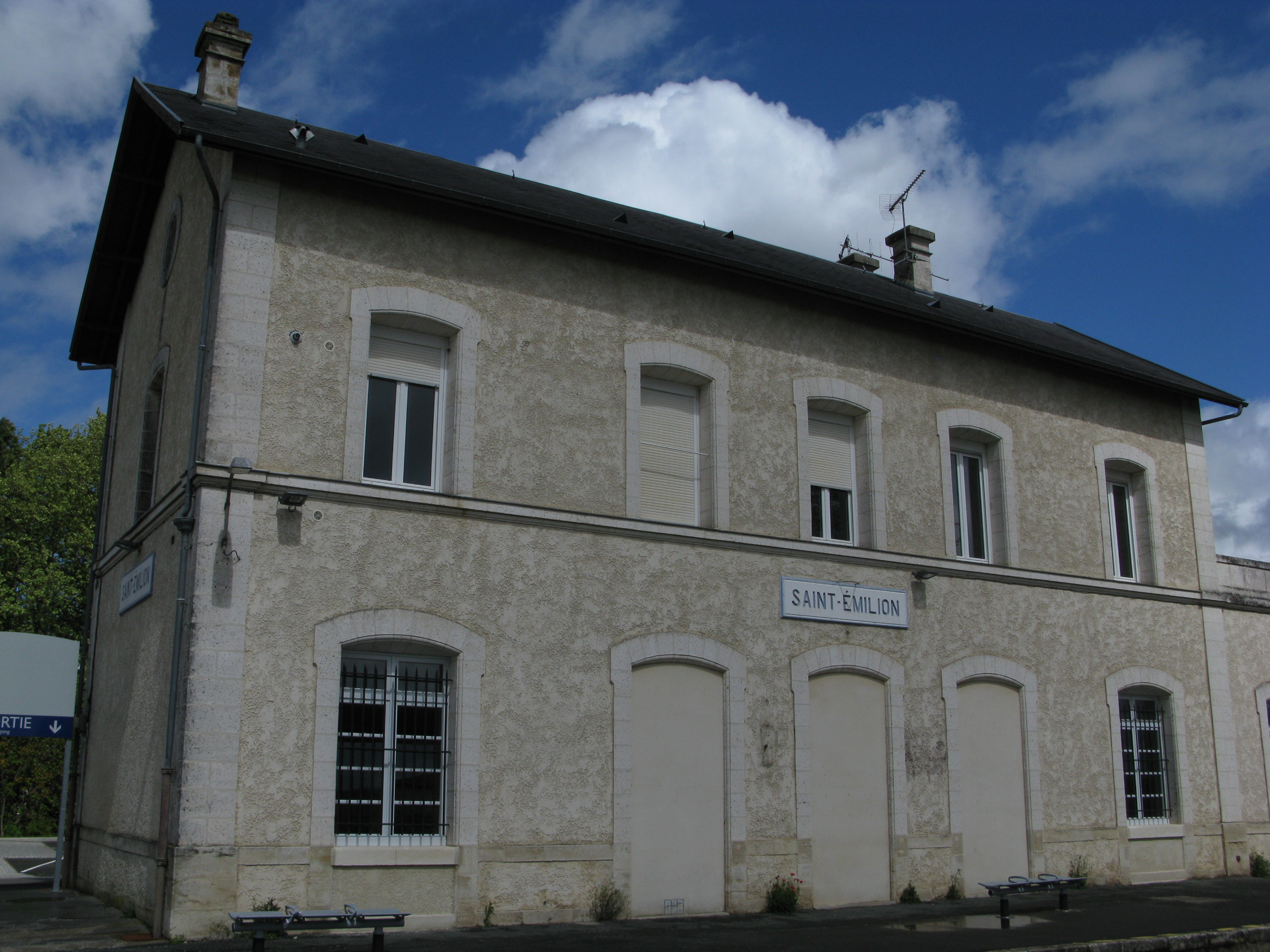 Gare de Saint-Émilion - depuis les voies